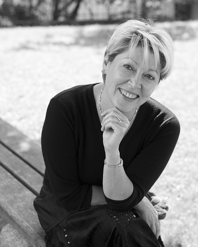 Véronique Carrot, claveciniste, cheffe de choeur, née le 8 mars 1958 à Forbach en Moselle. Portrait réalisé chez elle à Lausanne le 17 août 2006.